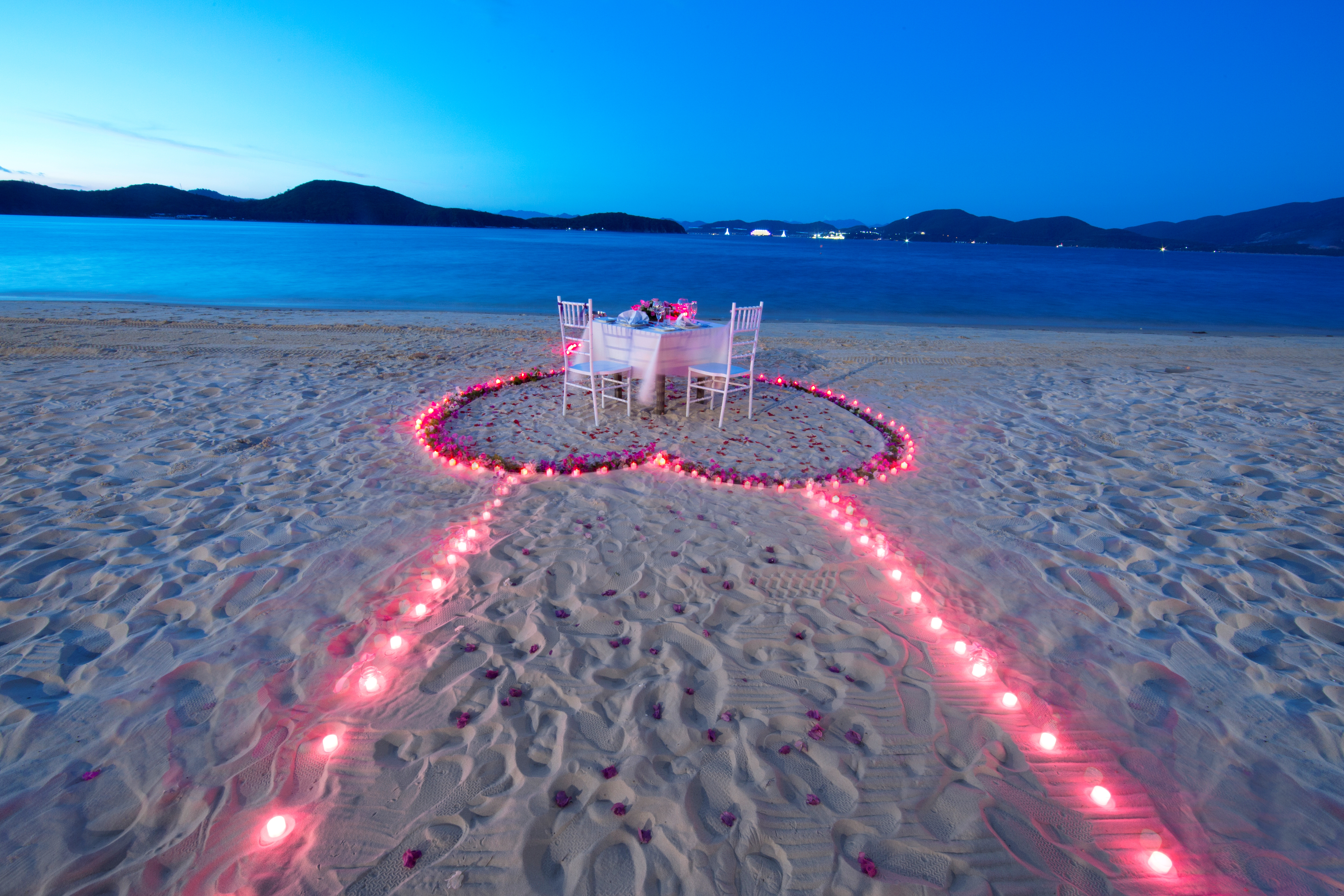 Trăng mật lãng mạn ở đảo Hòn Tằm